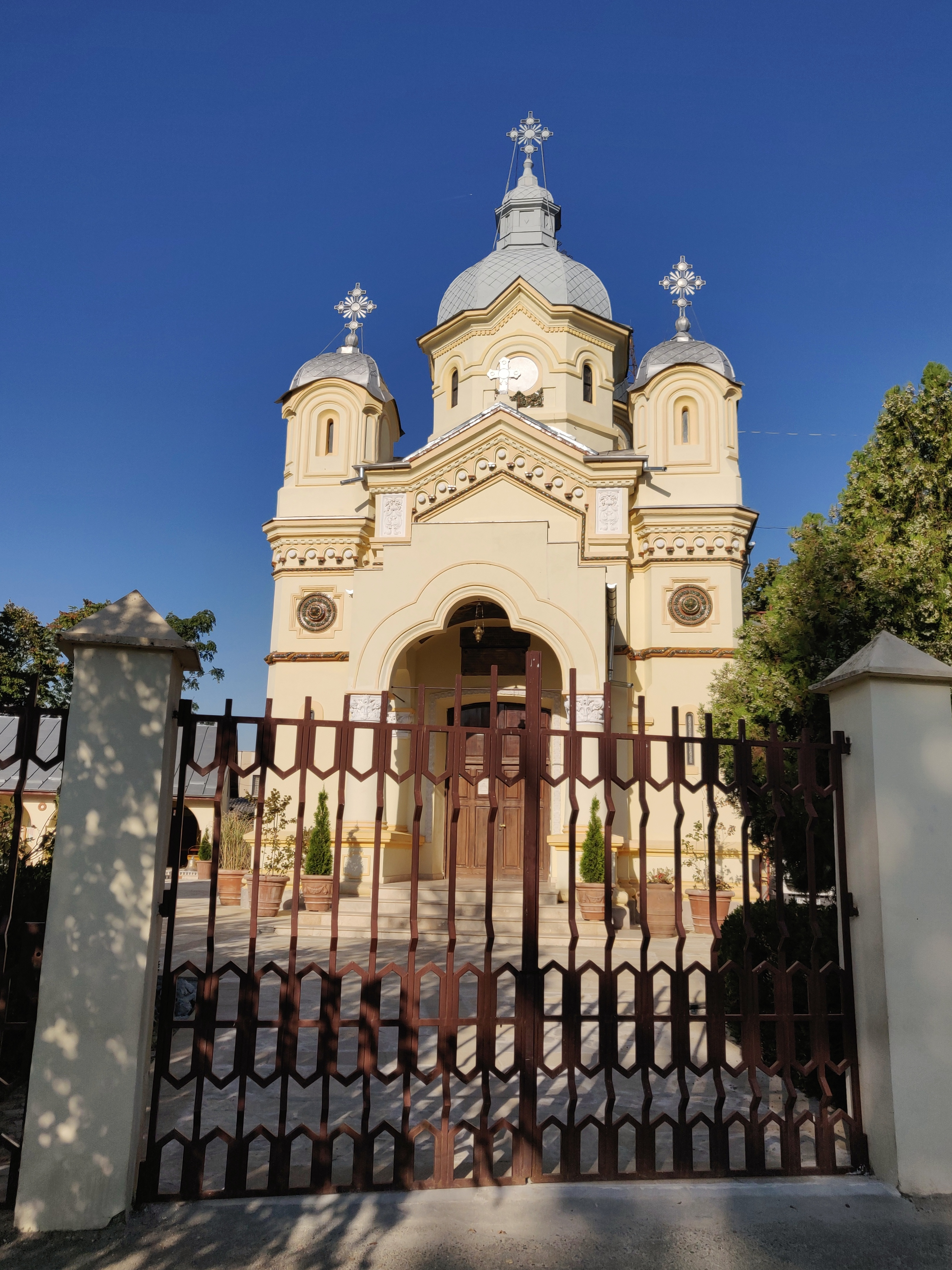 Biserica „Sf. Apostoli”